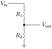 Resistive divider